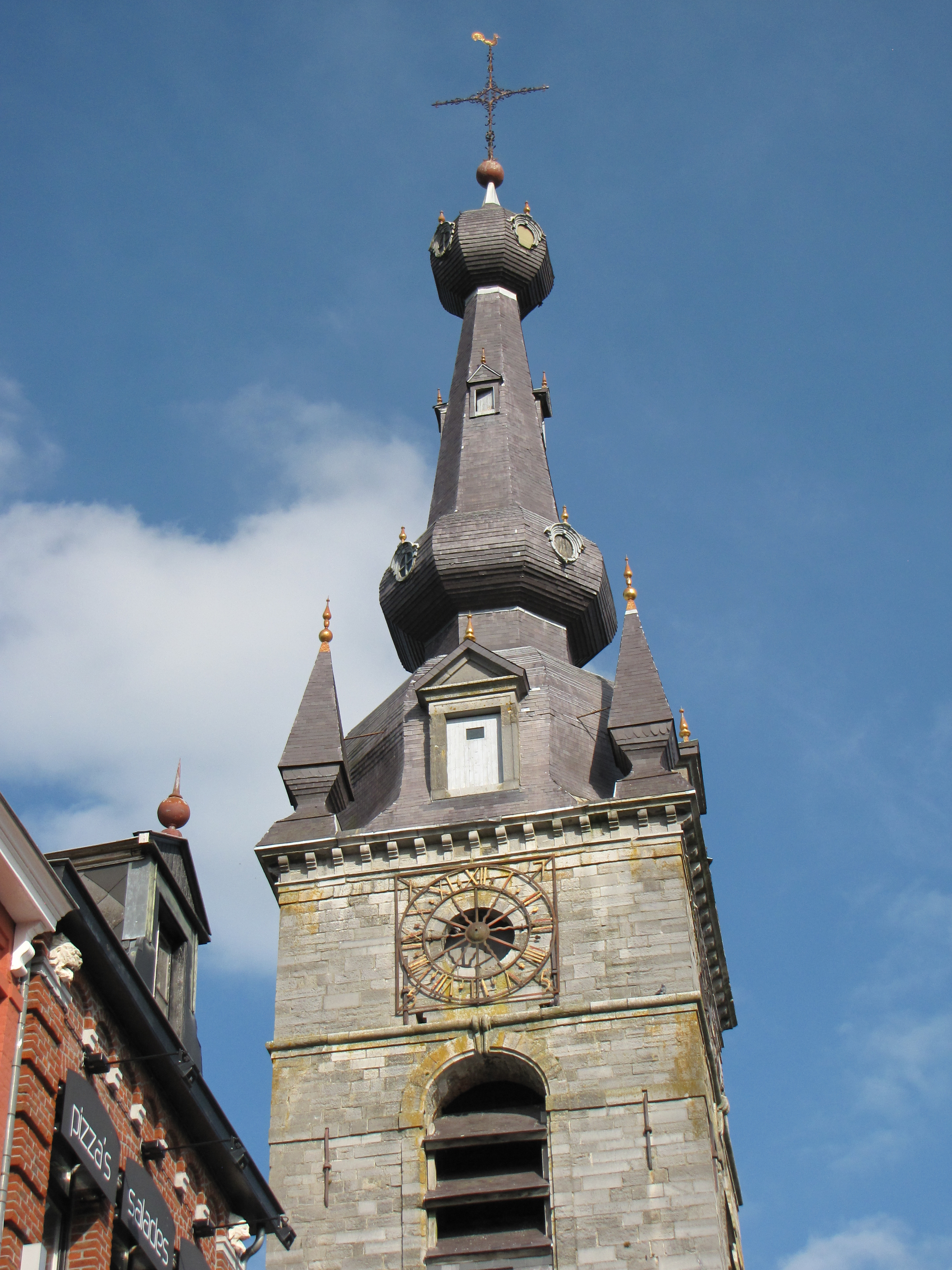 Maison